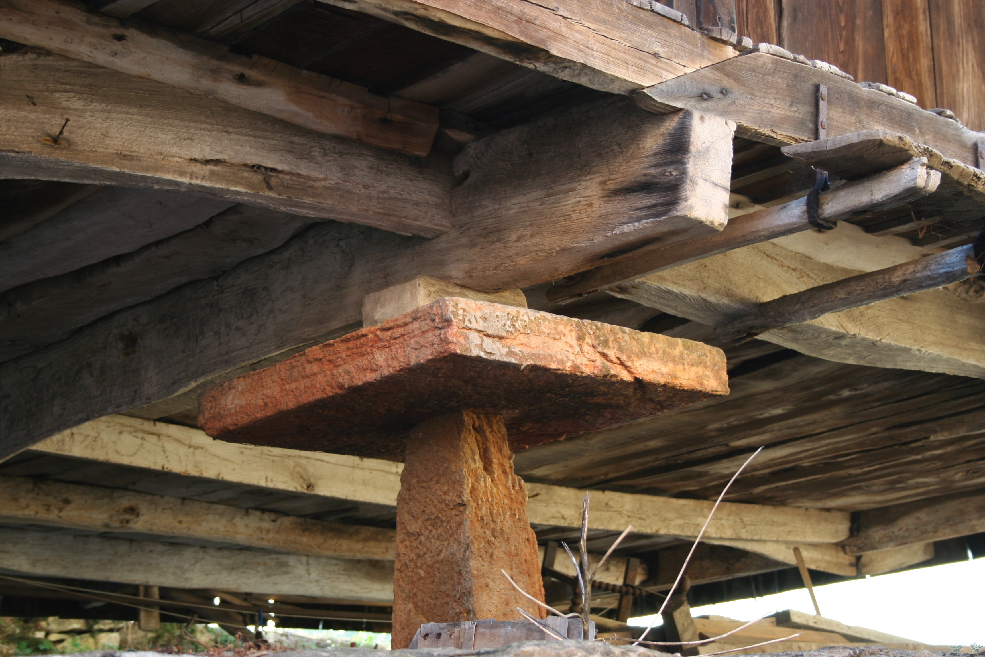 Detalle del pegollu (pilar del horreo o panera), muela (piedra plana sobre el pegollu) y el tillau (viga gruesa que da base al horreo)